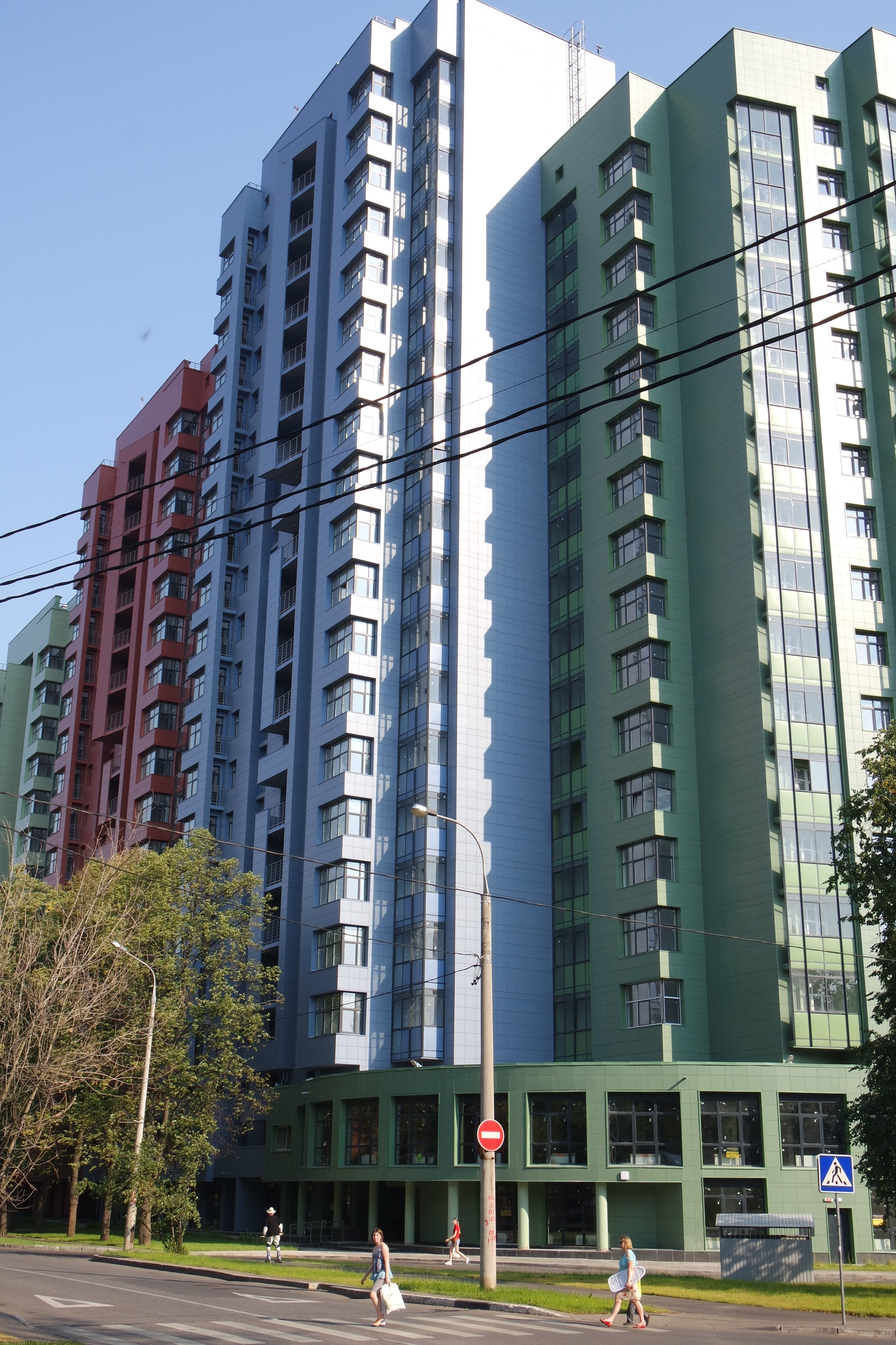 Жилой комплекс на улице Циолковского в Москве